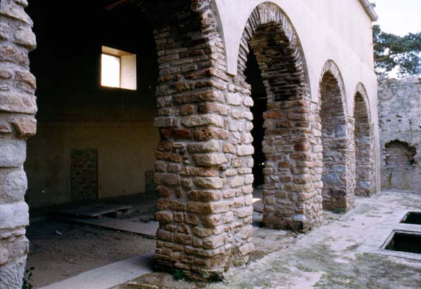 S.Antonio Abate, antica chiesa del rione gi Archi di Reggio Calabria